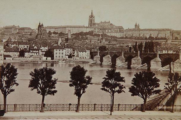 Pražský hrad z nábřeží.